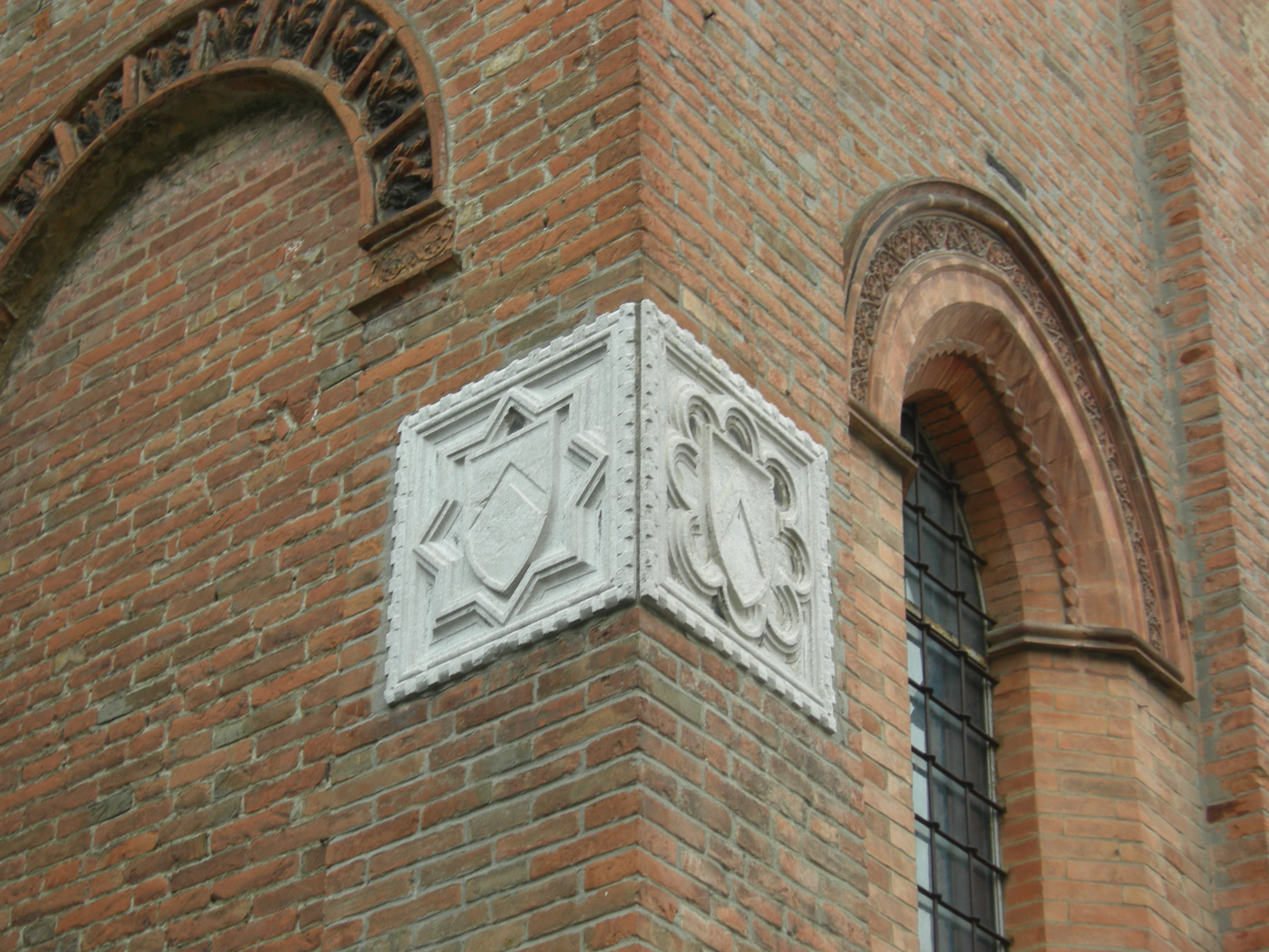 chiesa san Gregorio, Ferrara